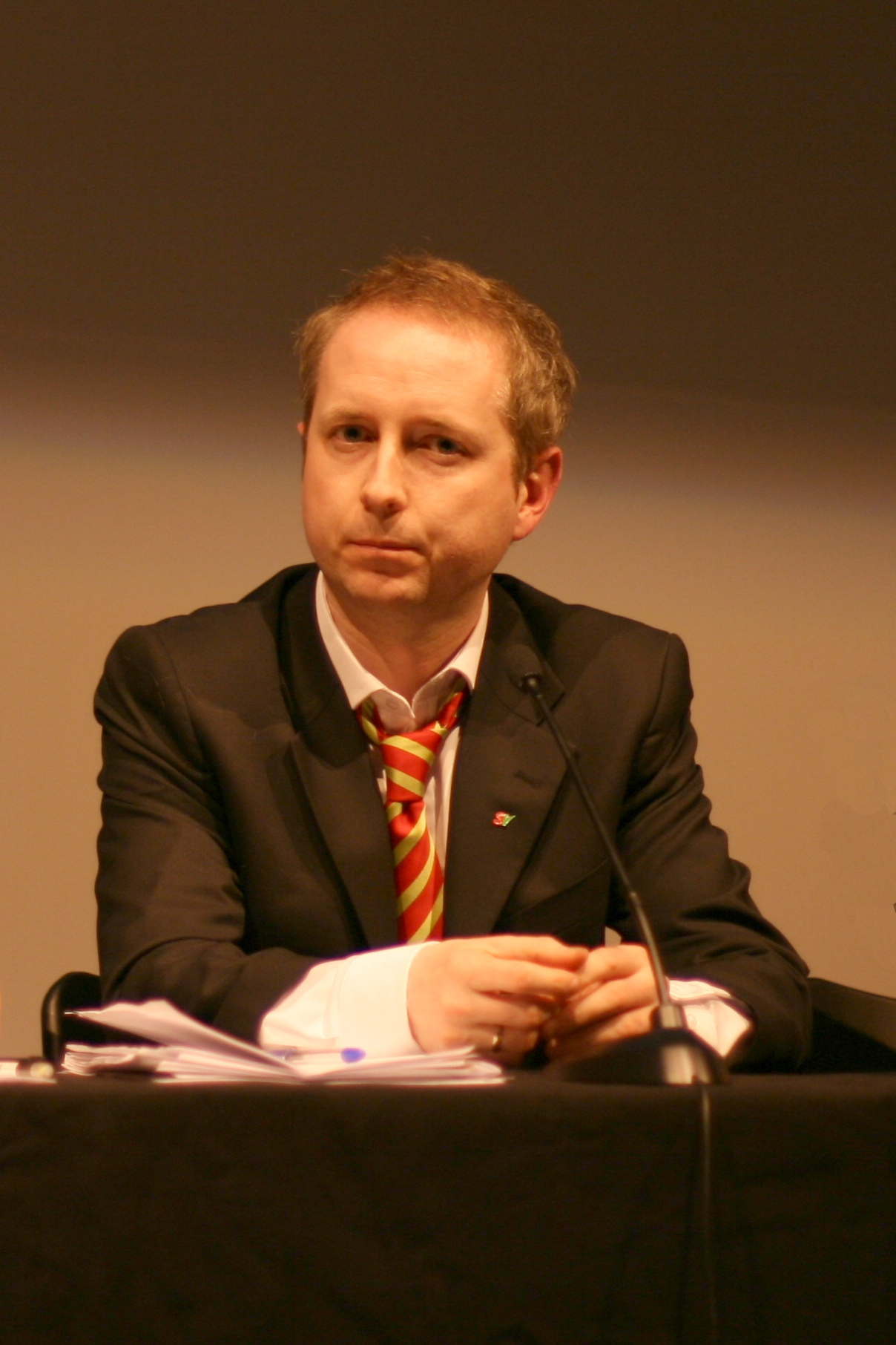 Bård Vegar Solhjell (SV) under paneldebatten i forbindelse med førpremieren på filmen Urospredere.